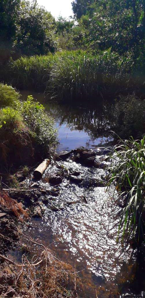 Museo histórico y Reserva Guillermo Hudson